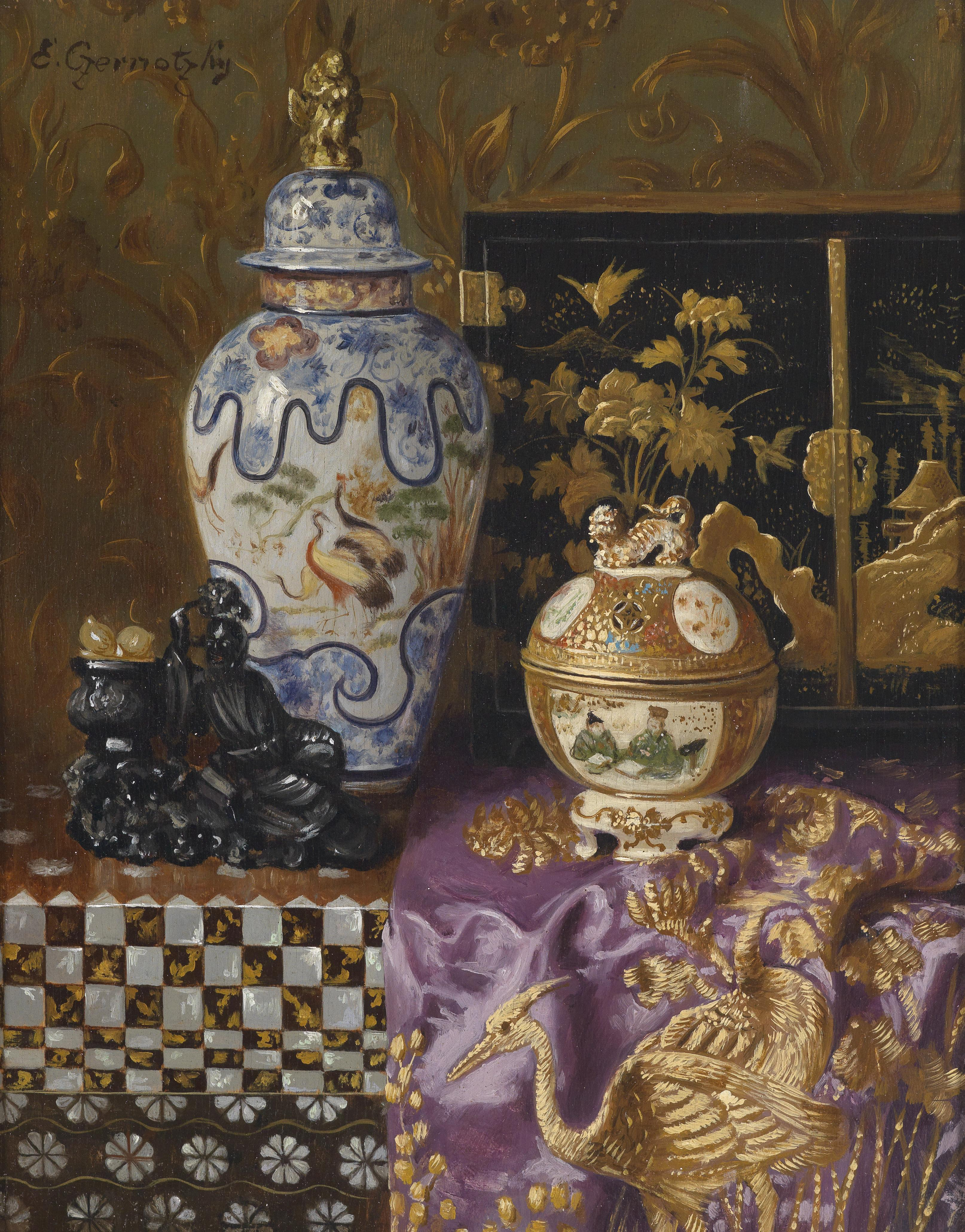 Stillleben mit Asiatika